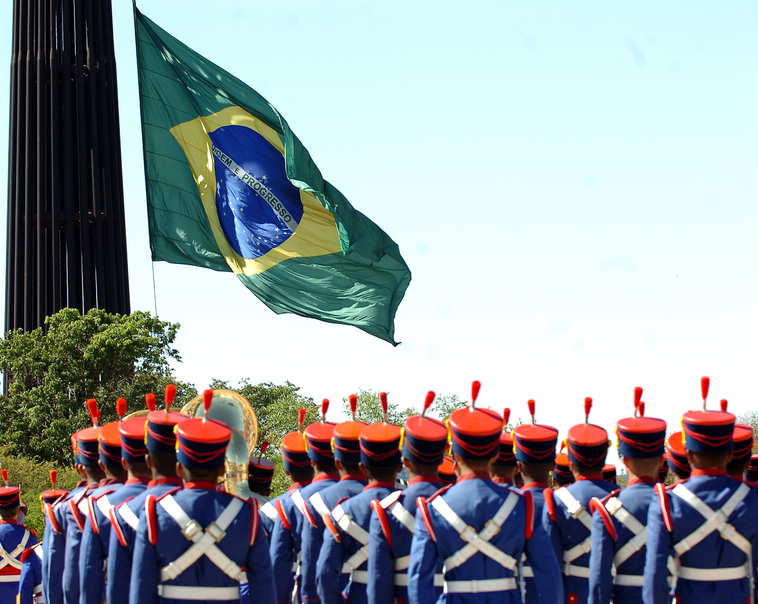 Brasília - Batalhão da Guarda Presidencial participa de solenidade de troca da Bandeira, na Praça dos Três Poderes, coordenada pelo Comando do Exército.